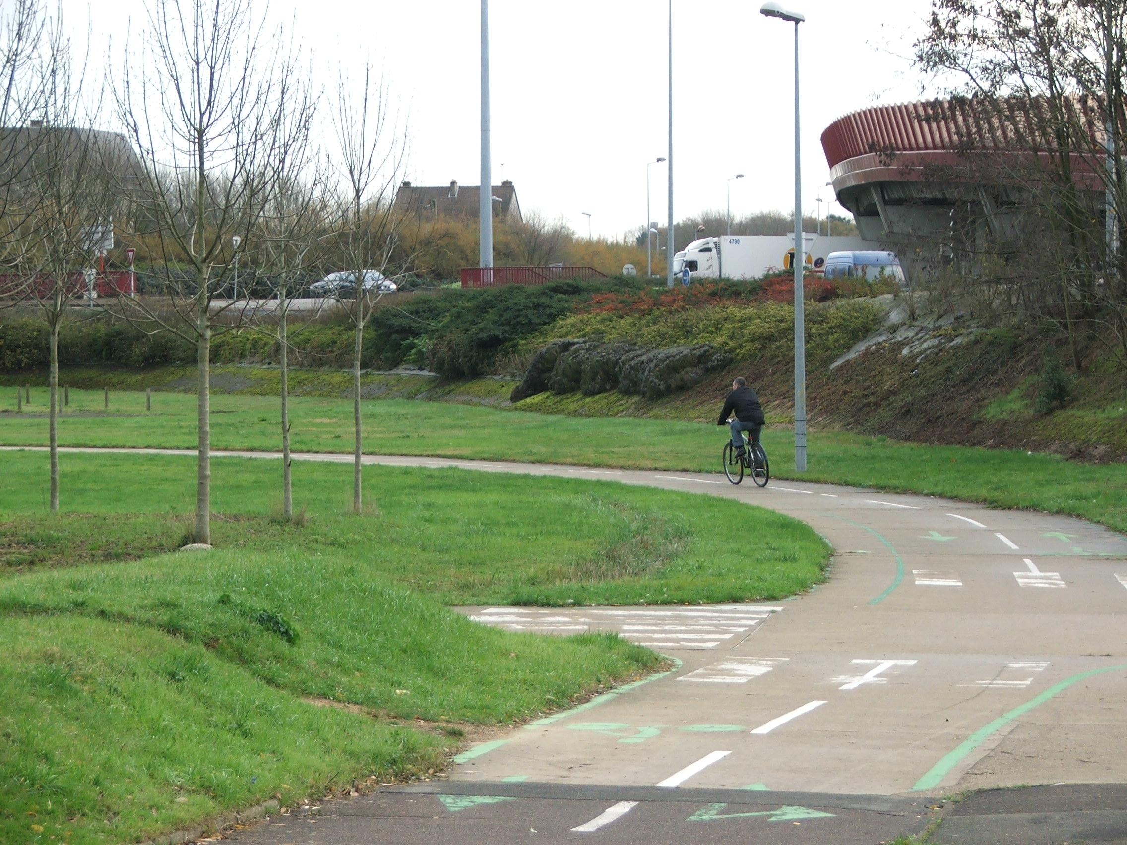 Le boulevard vert au niveau du pont rouge à la limite entre le Mans et Allonnes, sous la rocade ouest.